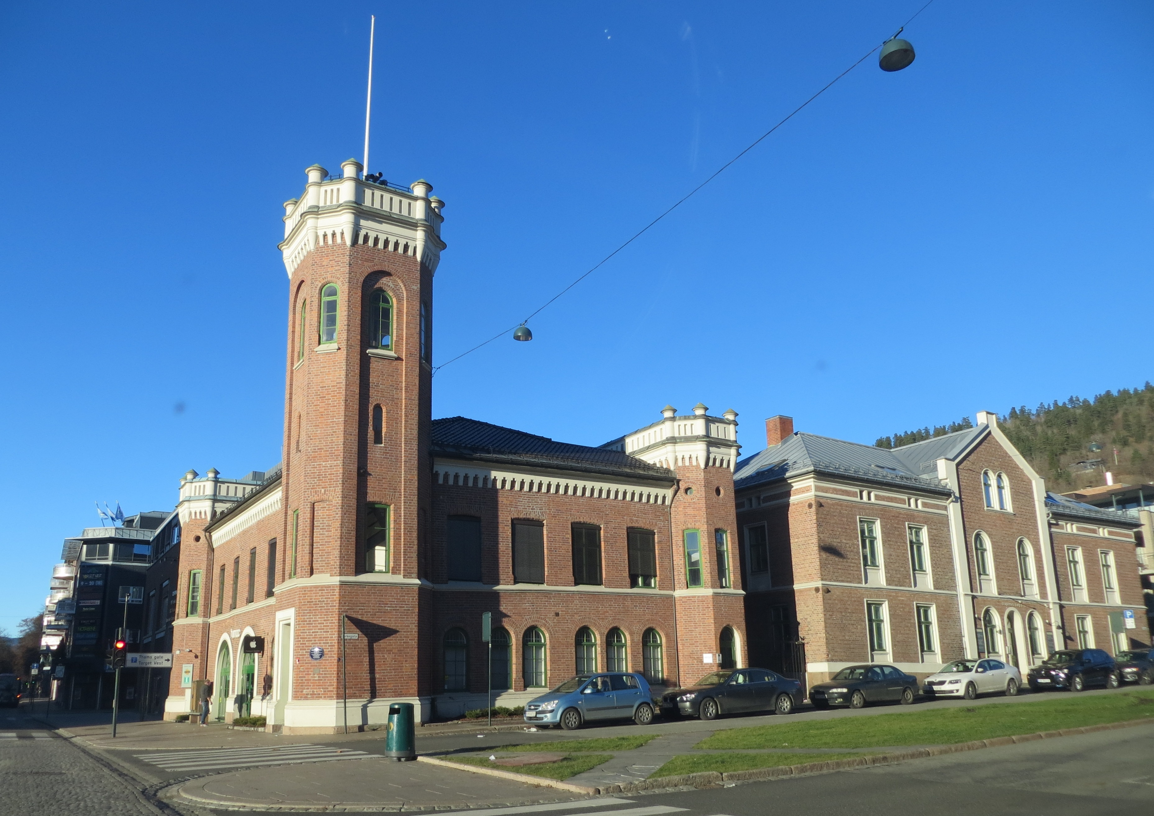 Bygård i Haugesgate på Bragernes i Drammen. Området er markert med verneverdi / vernestatus hos Riksantikvaren ( Den gamle brannstasjonen på Bragernes, oppført ca 1867. Arkitekt: byarkitekt Halvor Heyerdahl (1825–1900).